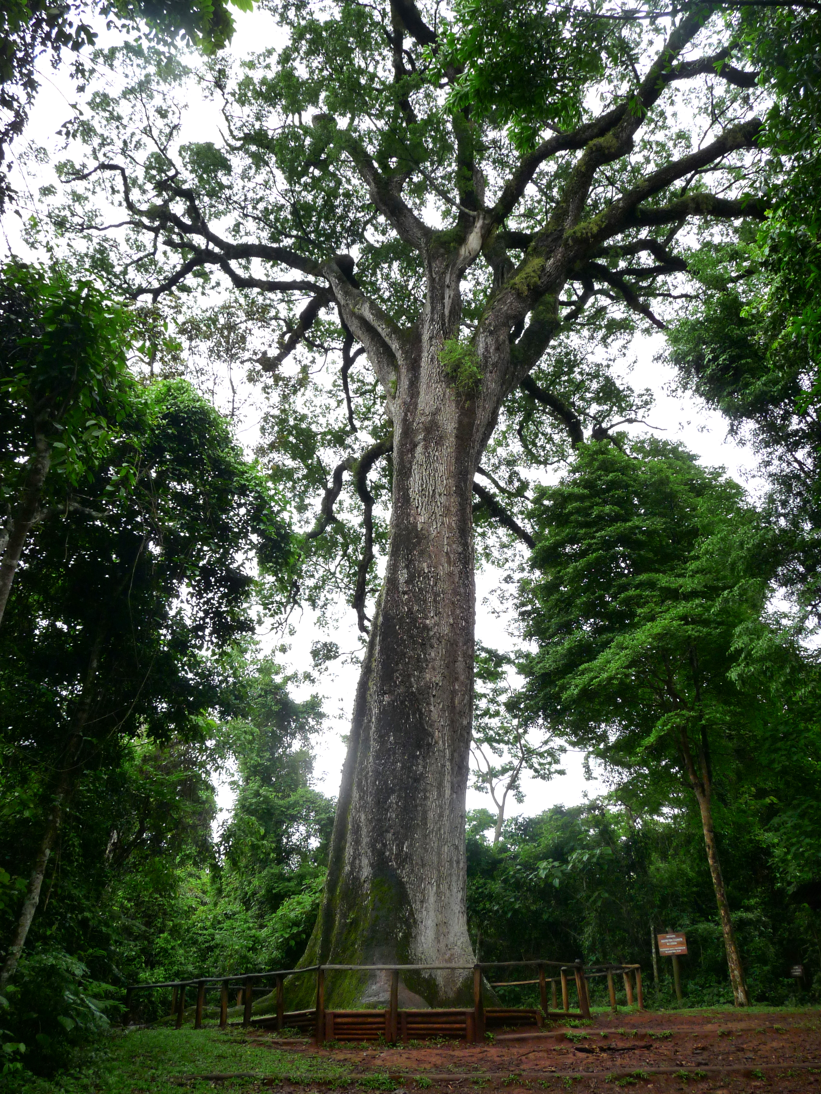 Indivíduo mais antigo de jequitibá